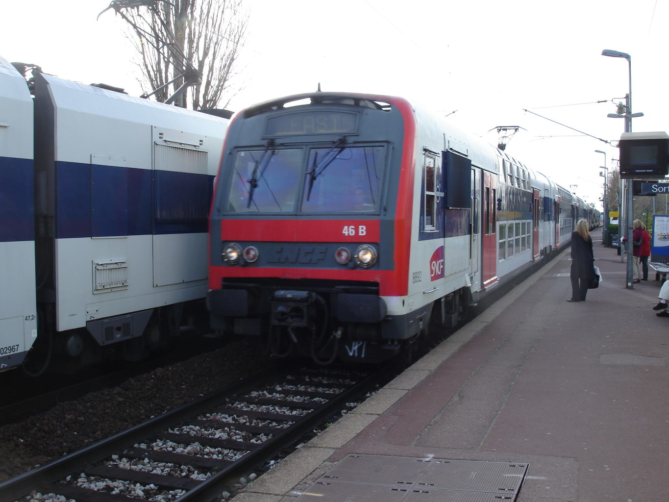 Gare de Cernay à Ermont (Val-d'Oise), France Entrée en gare d'une rame automotrice Z 8800 du RER C en direction de Bibliothèque François Mitterrand Avril 2007 Photo personnelle de Clicsouris